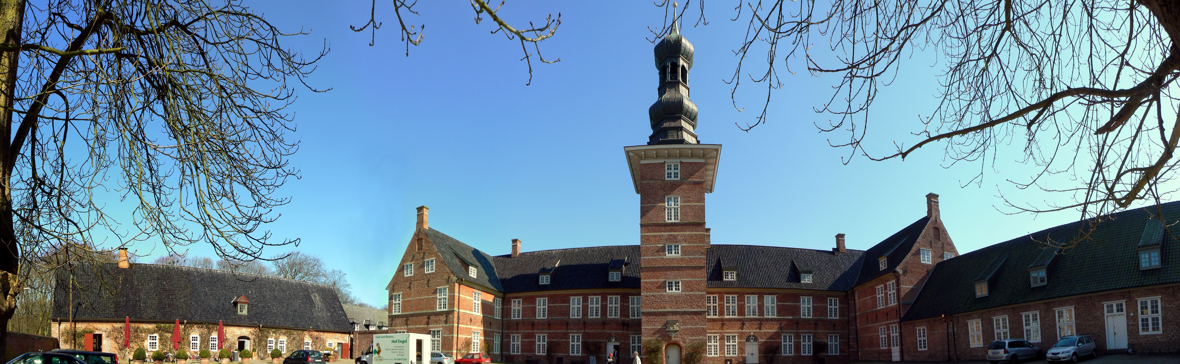 Schloss vor Husum. Panorama des Innenhofs aus 7 Einzelbildern zusammengesetzt. Blickwinkel ca. 180°.